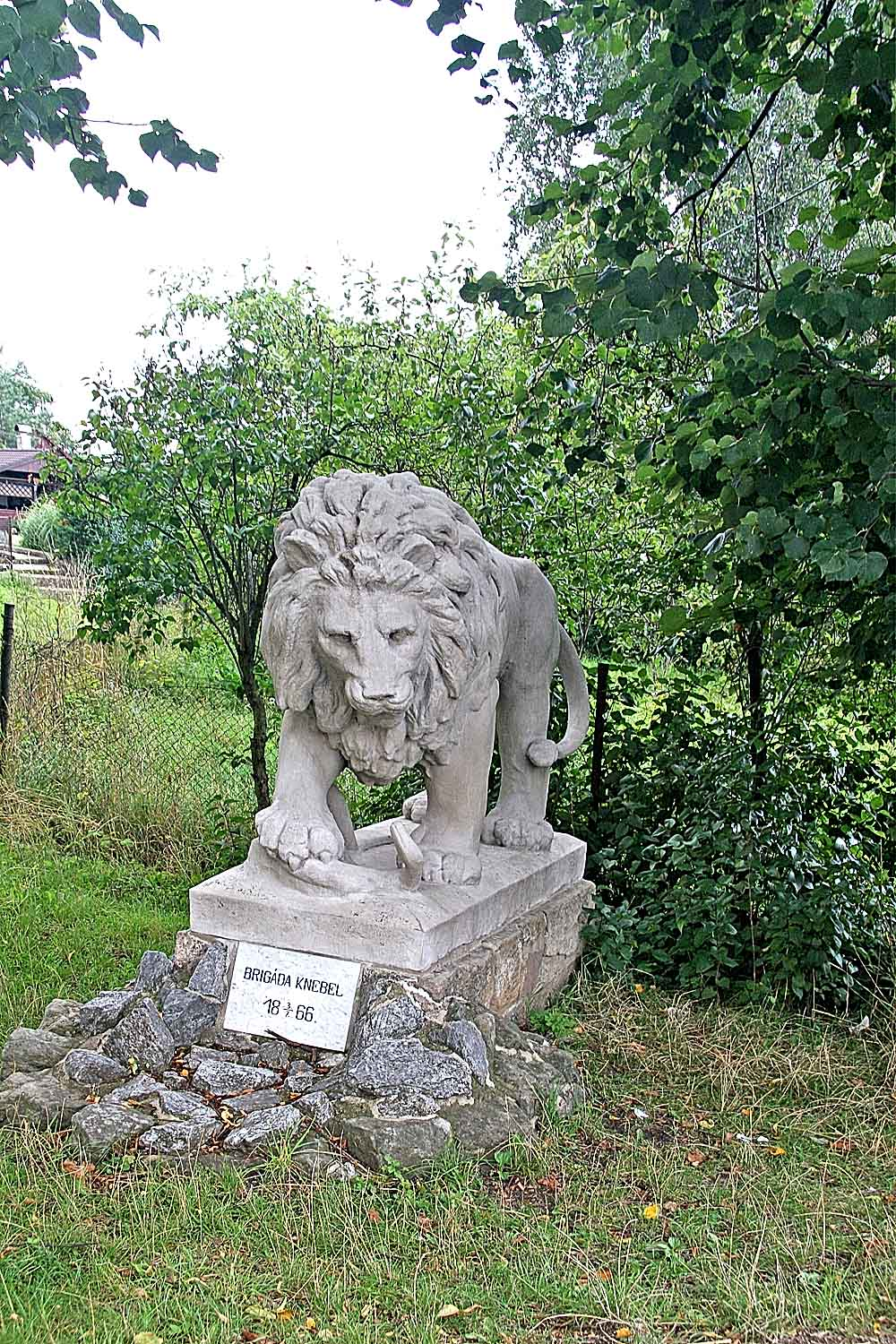 Pomník války roku 1866,Dohalice, okres Hradec Králové